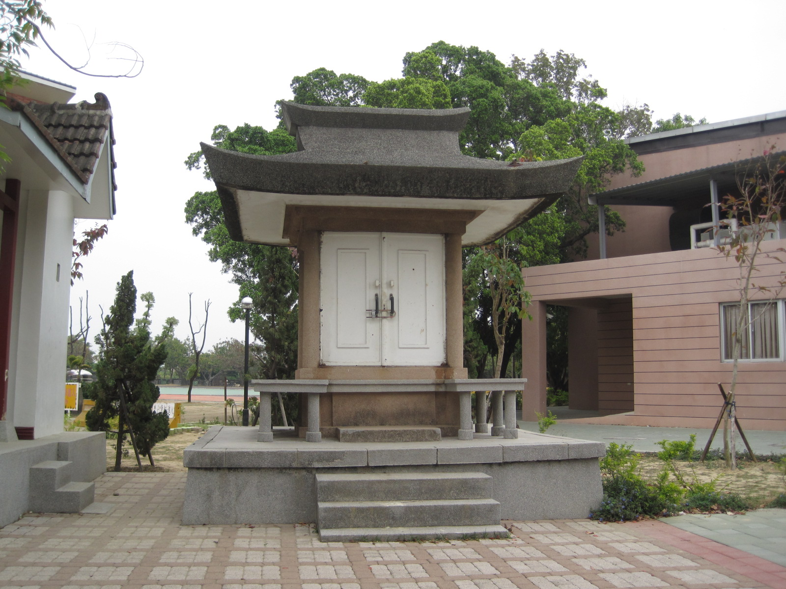 原新化尋常小學校御真影奉安殿